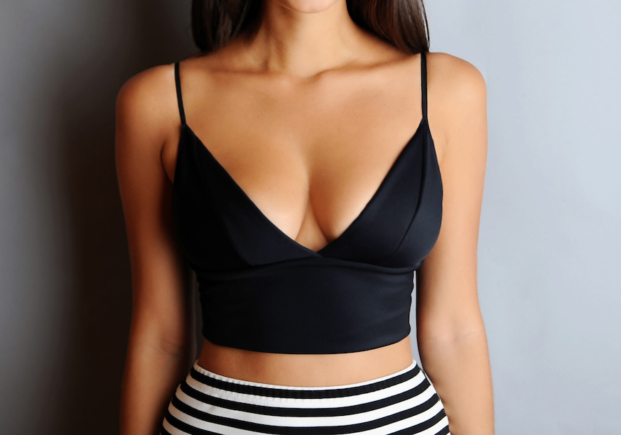 DIY Alexander Wang Inspired Bralette